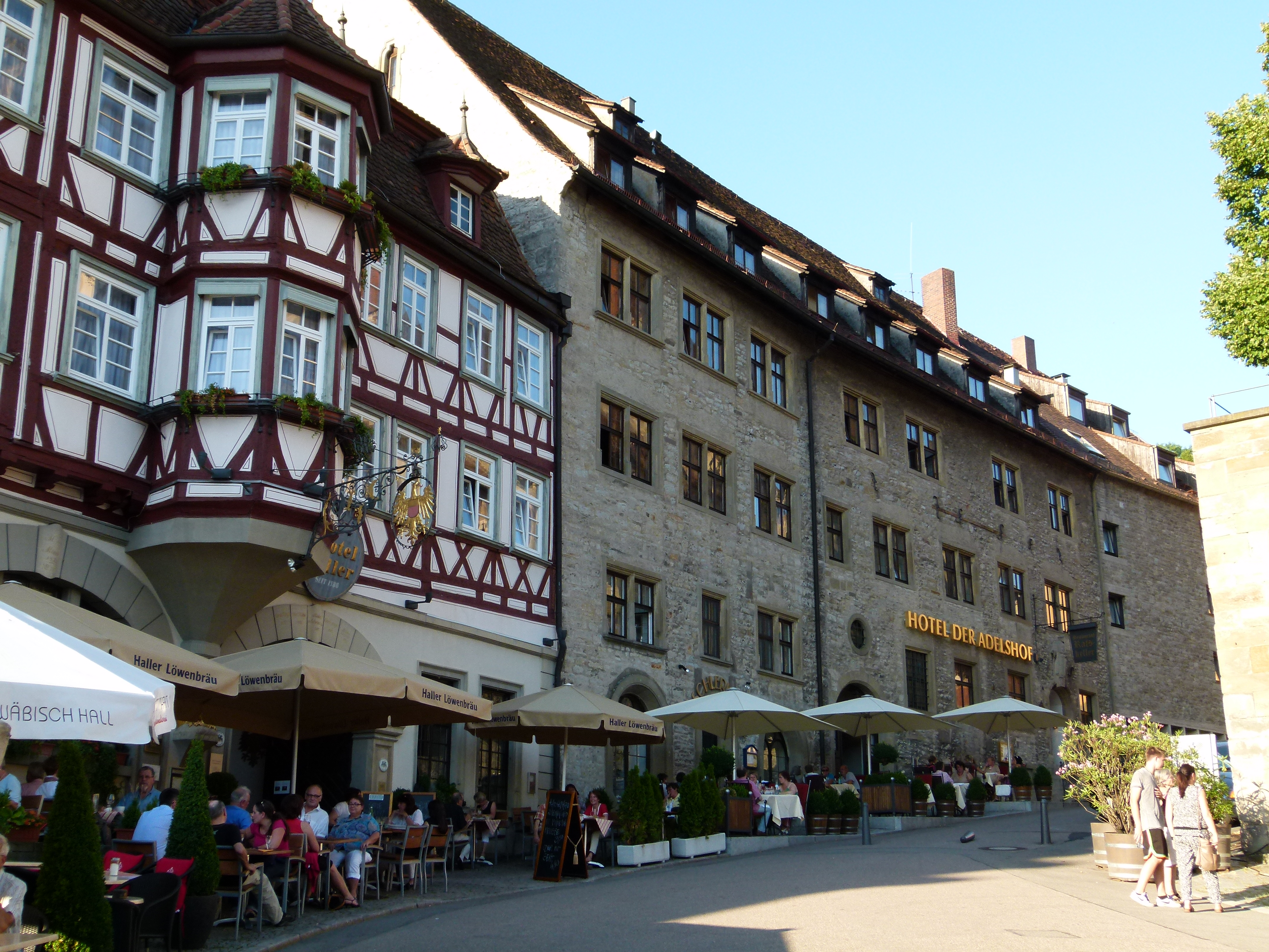 Denkmalgeschützte Häuser, Am Markt 11-12, Schwäbisch Hall